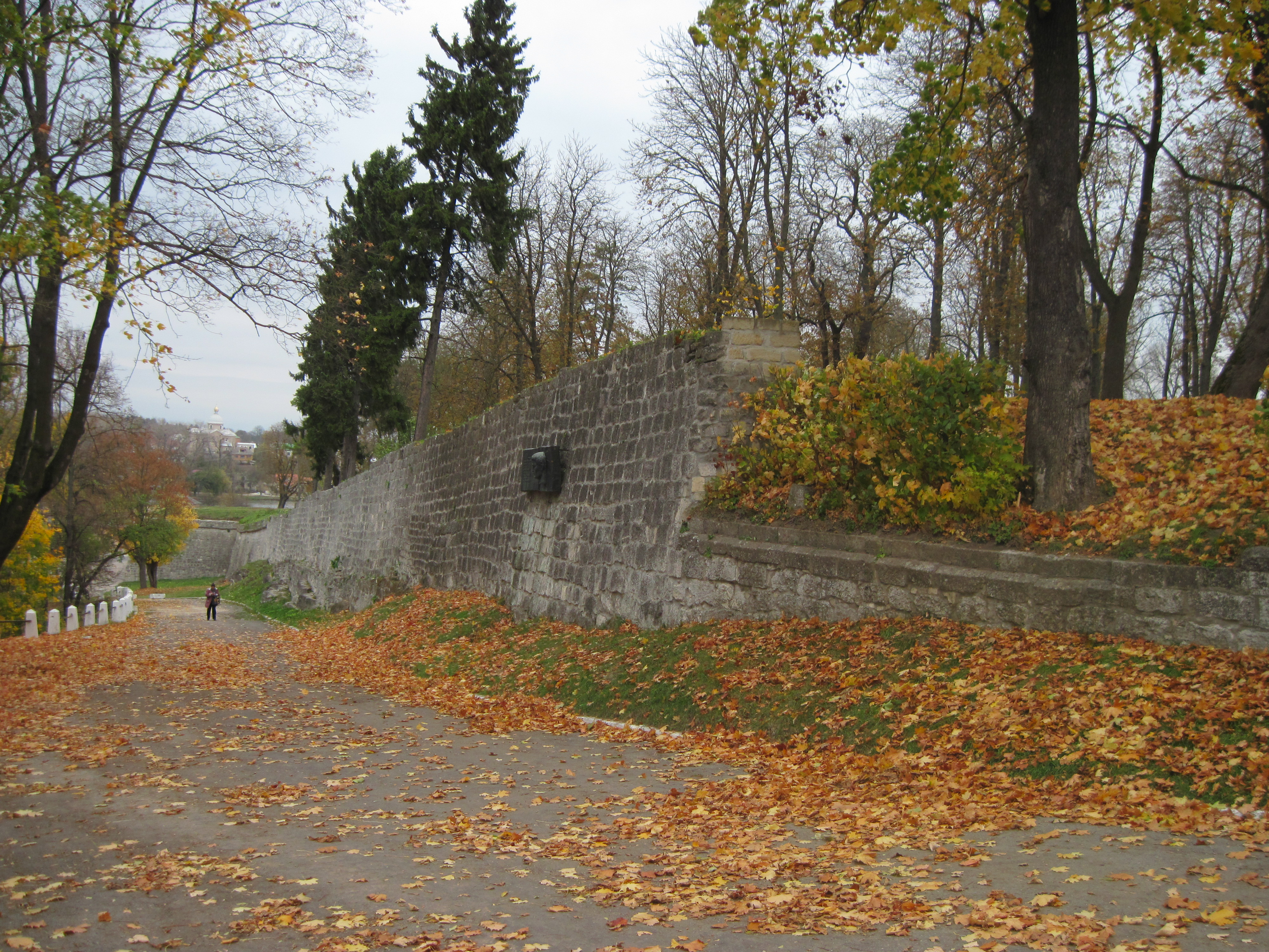 Збаразький замок